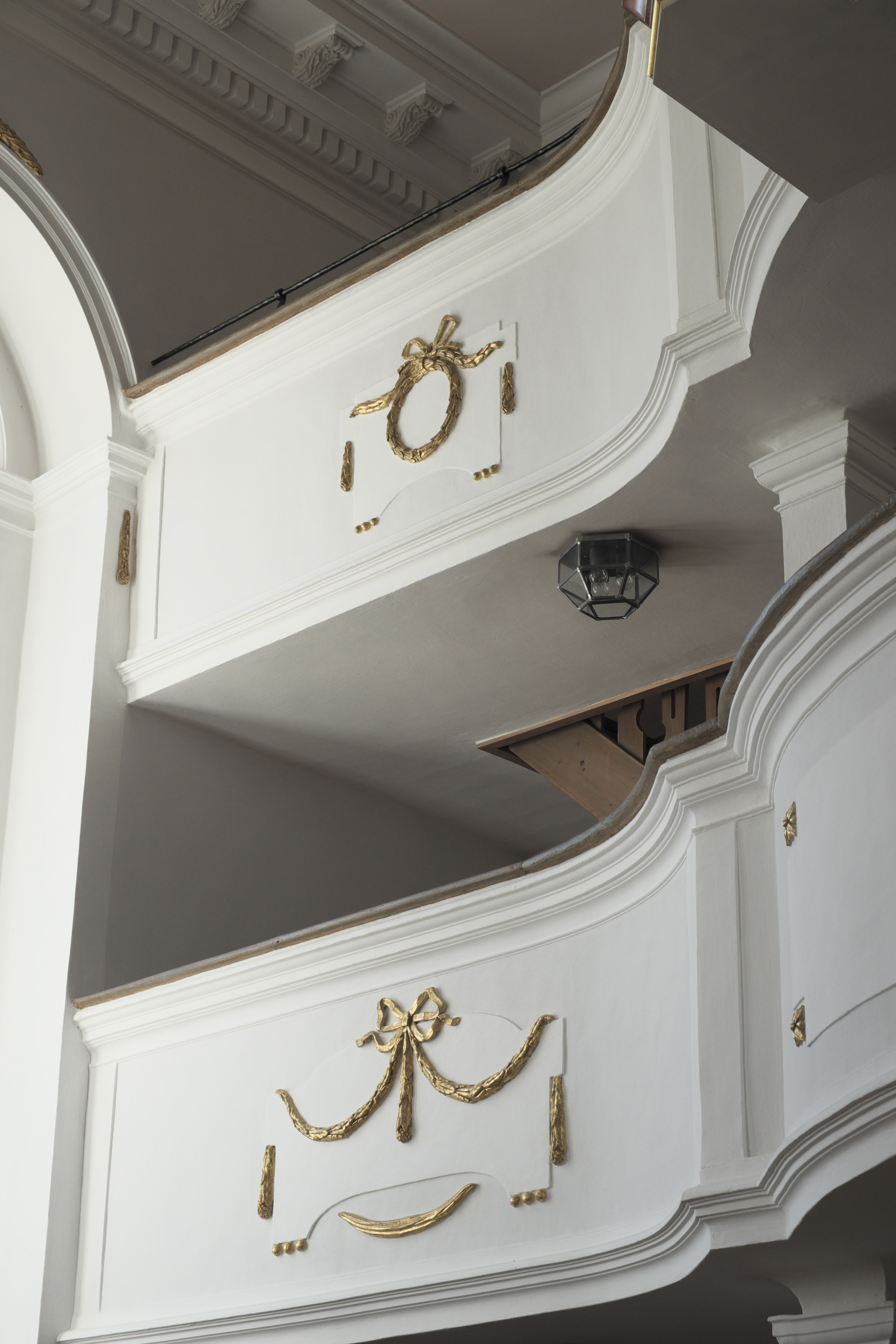 Katholische Pfarrkirche St. Bartholomäus in Epfach (Denklingen) im Landkreis Landsberg am Lech (Bayern/Deutschland), Empore